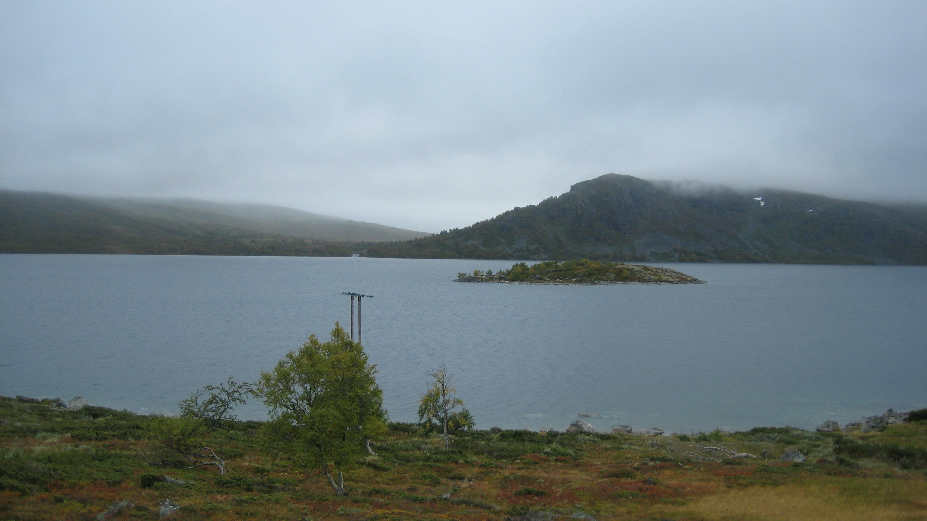 Strandavatnet, Hol. Hallingskarvet nasjonalpark i bakgrunnen